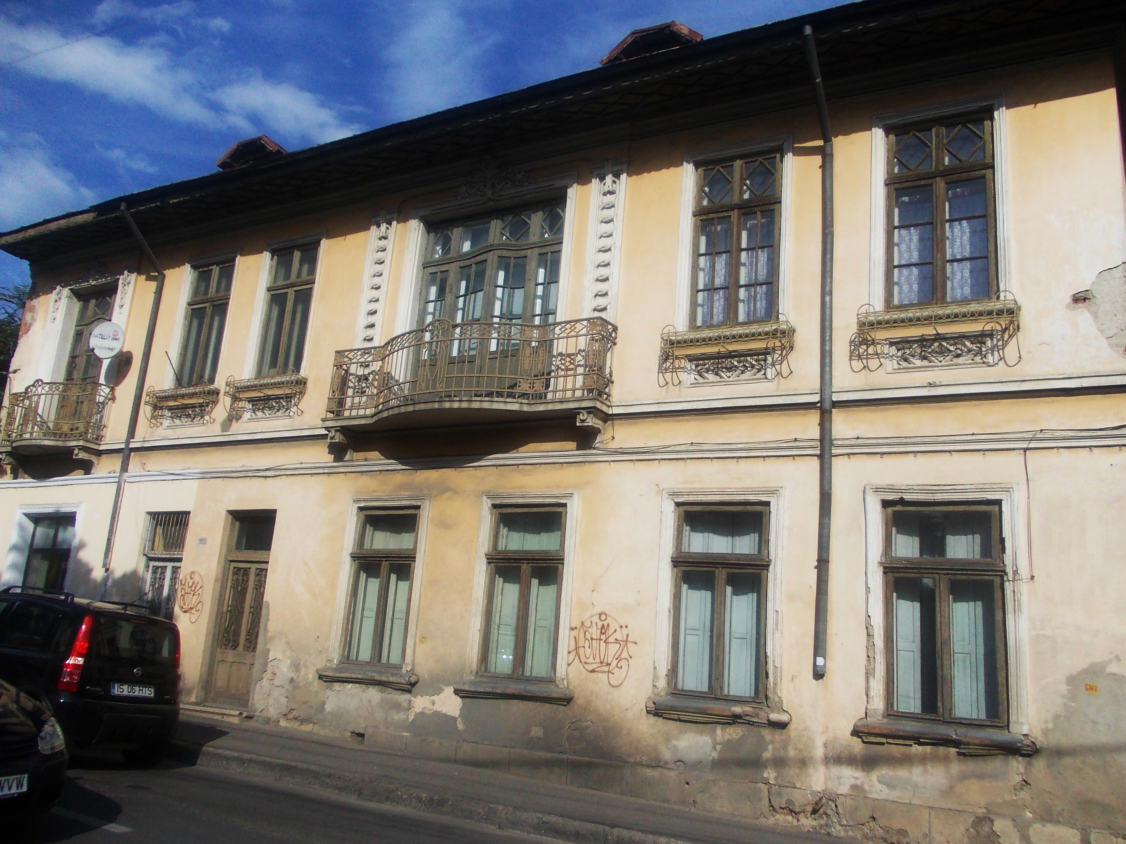 municipiul Iași, Str. Armeană 9